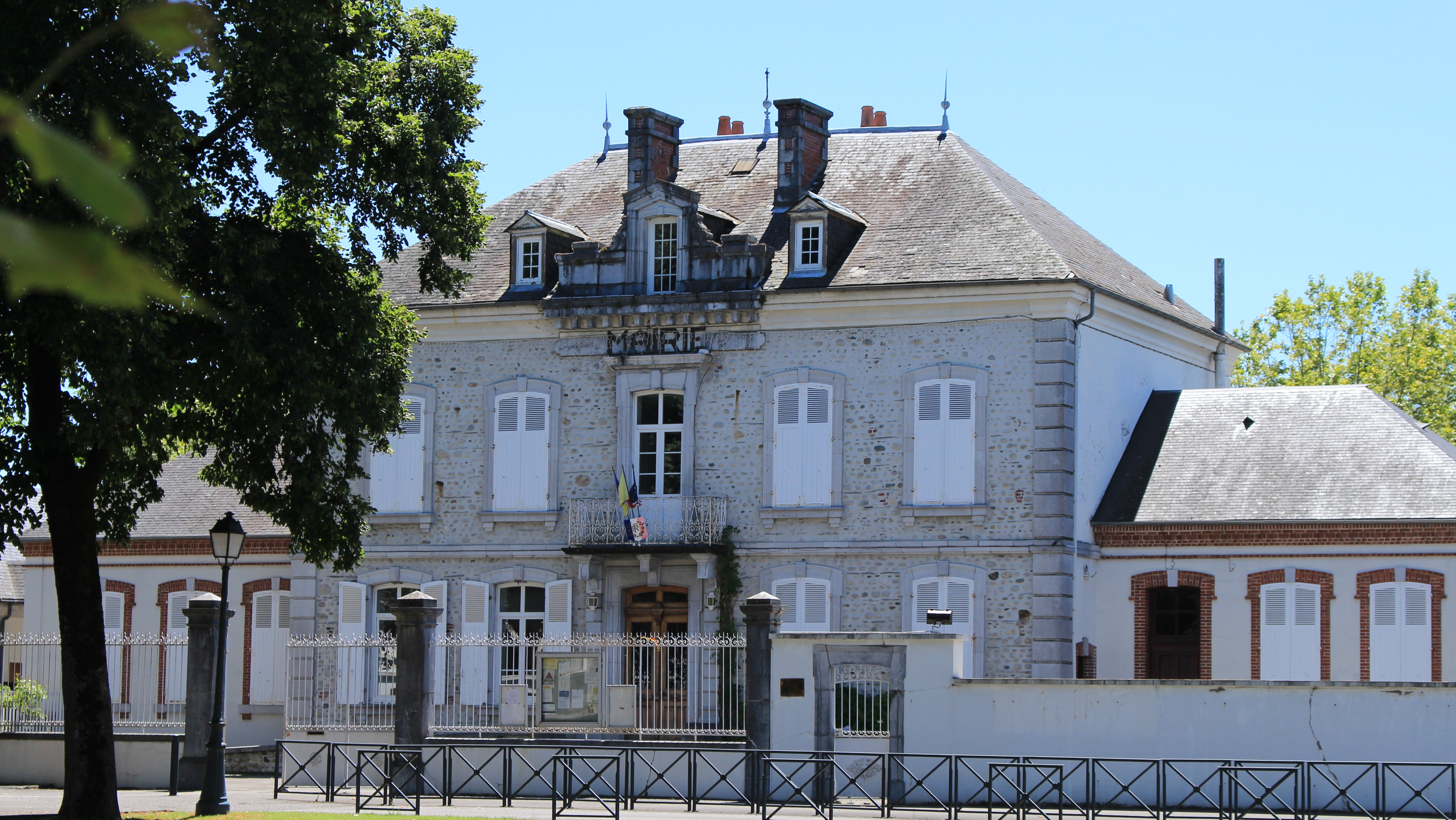 Mairie de Laloubère (Hautes-Pyrénées)